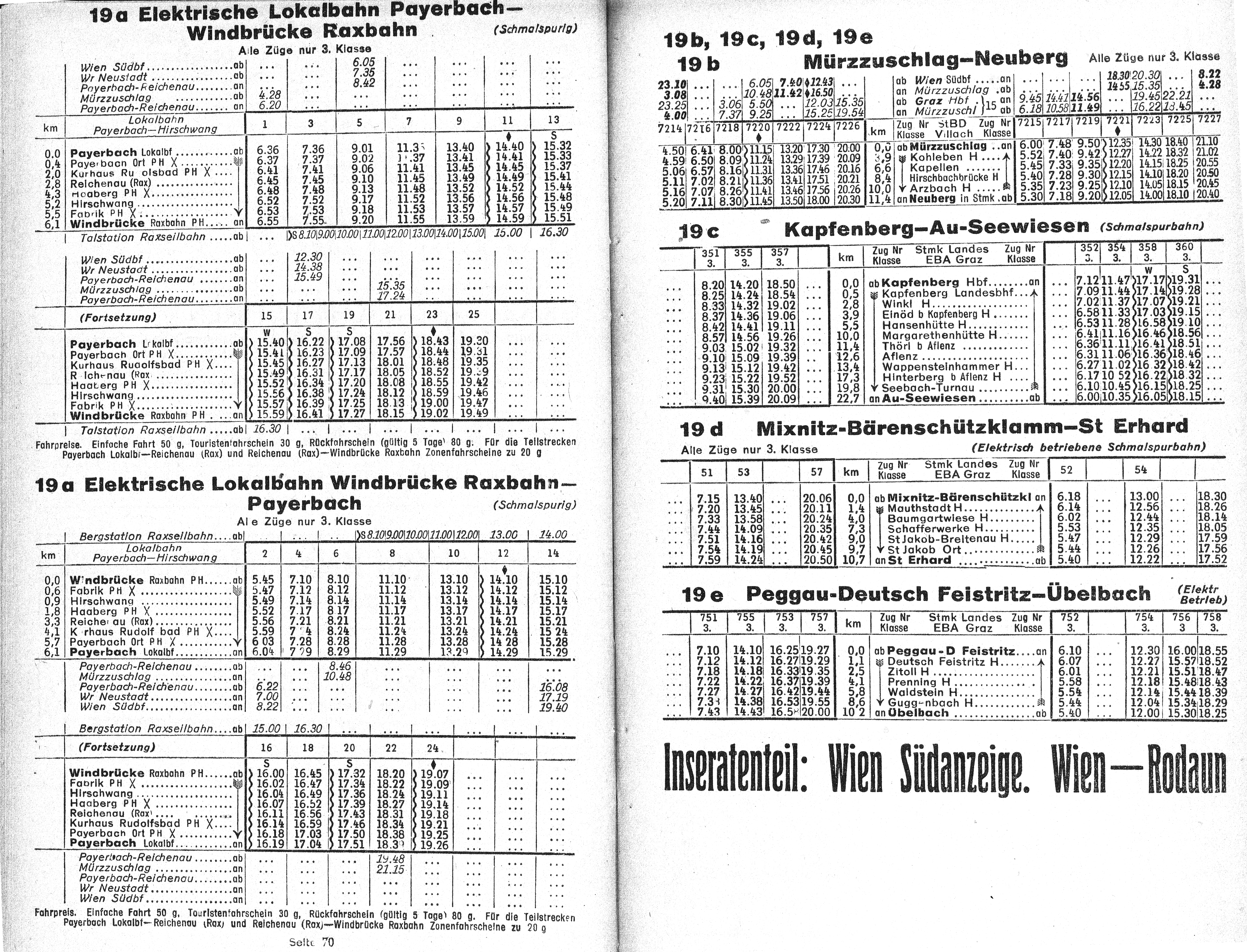 Fahrpläne der Bahndienste der Österreichischen Bundesbahnen (Staatseisenbahnnen) und Privatbahnen 1946/47 für die Höllentalbahn Payerbach - Hirschwang, die Neuberger Bahn Mürzzuschlag - Neuberg, die Thörlerbahn, die Breitenauerbahn und die Lokalbahn Peggau - Übelbach